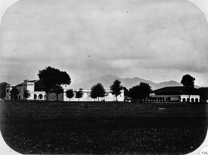 Foto. Kazernes te Poerworedjo